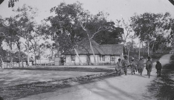 Foto. Een groep Atoni's op een weg bij Soé